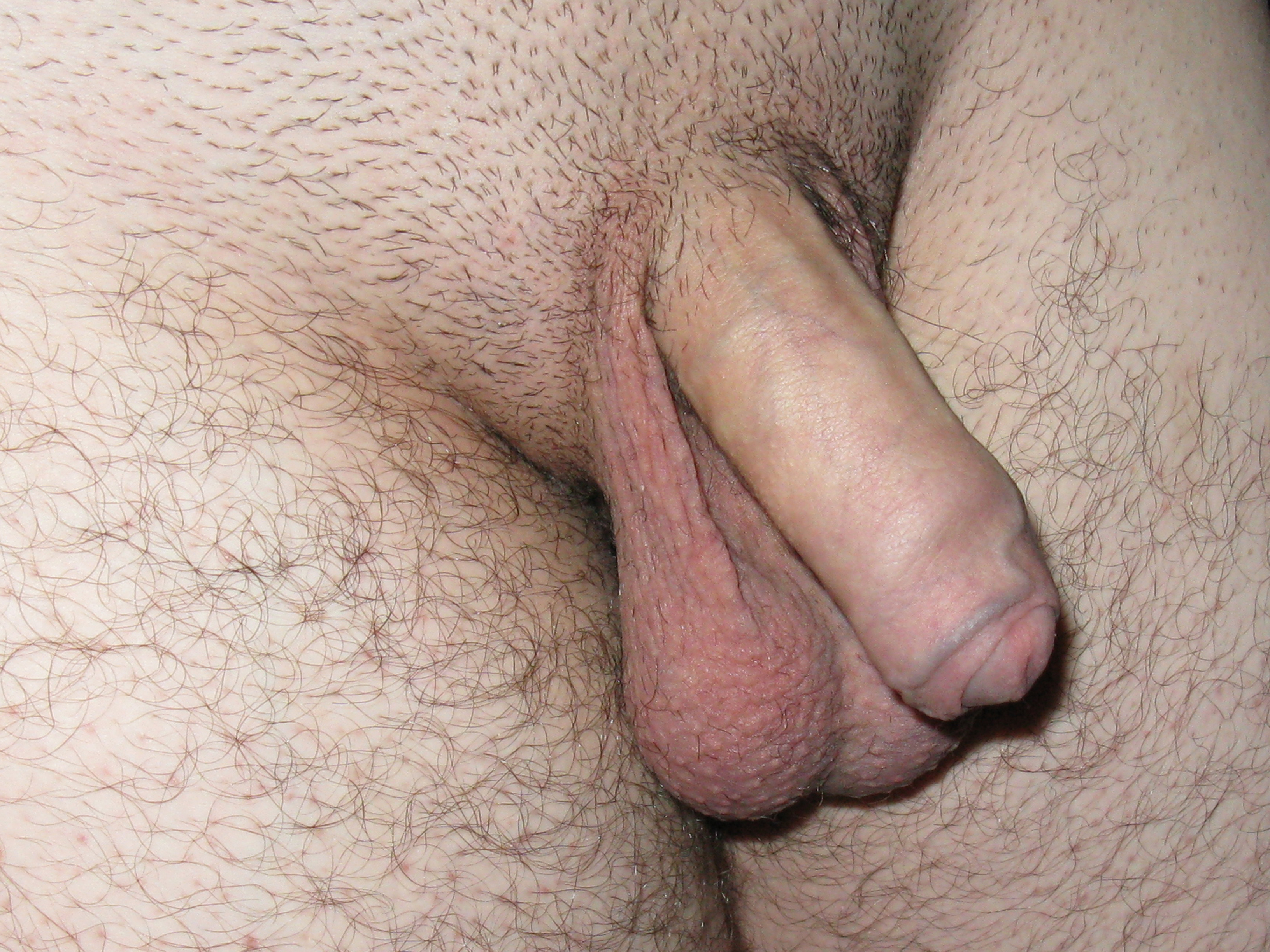 penis, hodensack, hoden, vorhaut